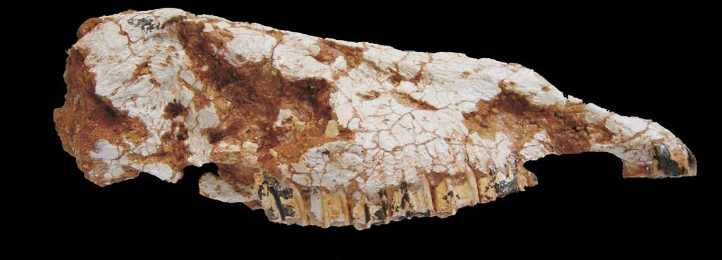 Equid Hipparion macedonicum Koufos, 1984 (LGPUT RPl-125) from Ravin de la Pluie, Axios Valley (Macedonia, Greece), late Vallesian, MN 10 (Late Miocene).